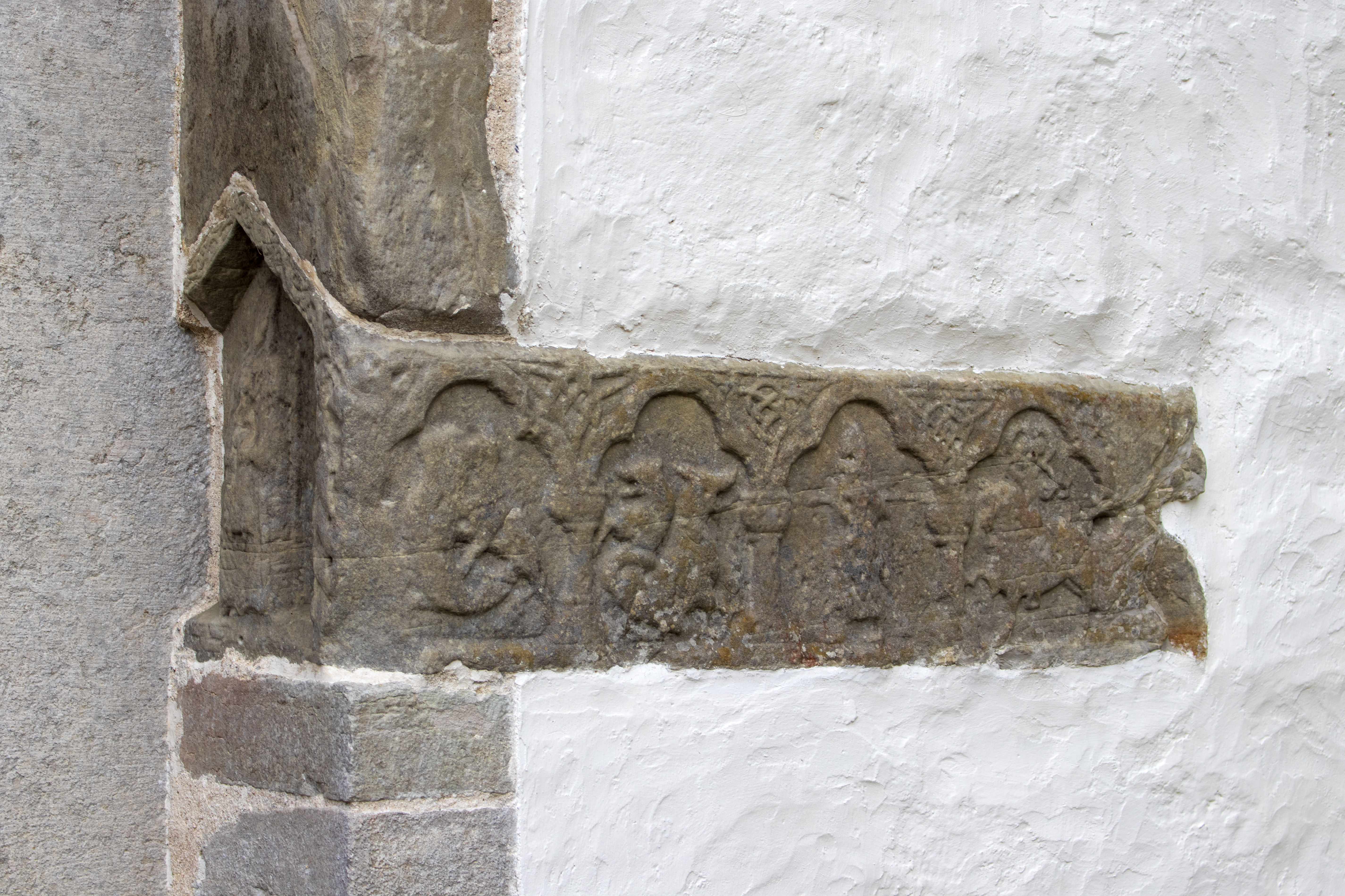 Relieve no portal da torre da igrexa de Lye, na illa sueca de Gotland.